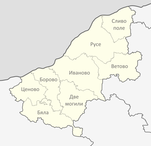 Картата е създадена от Любомир Таушанов